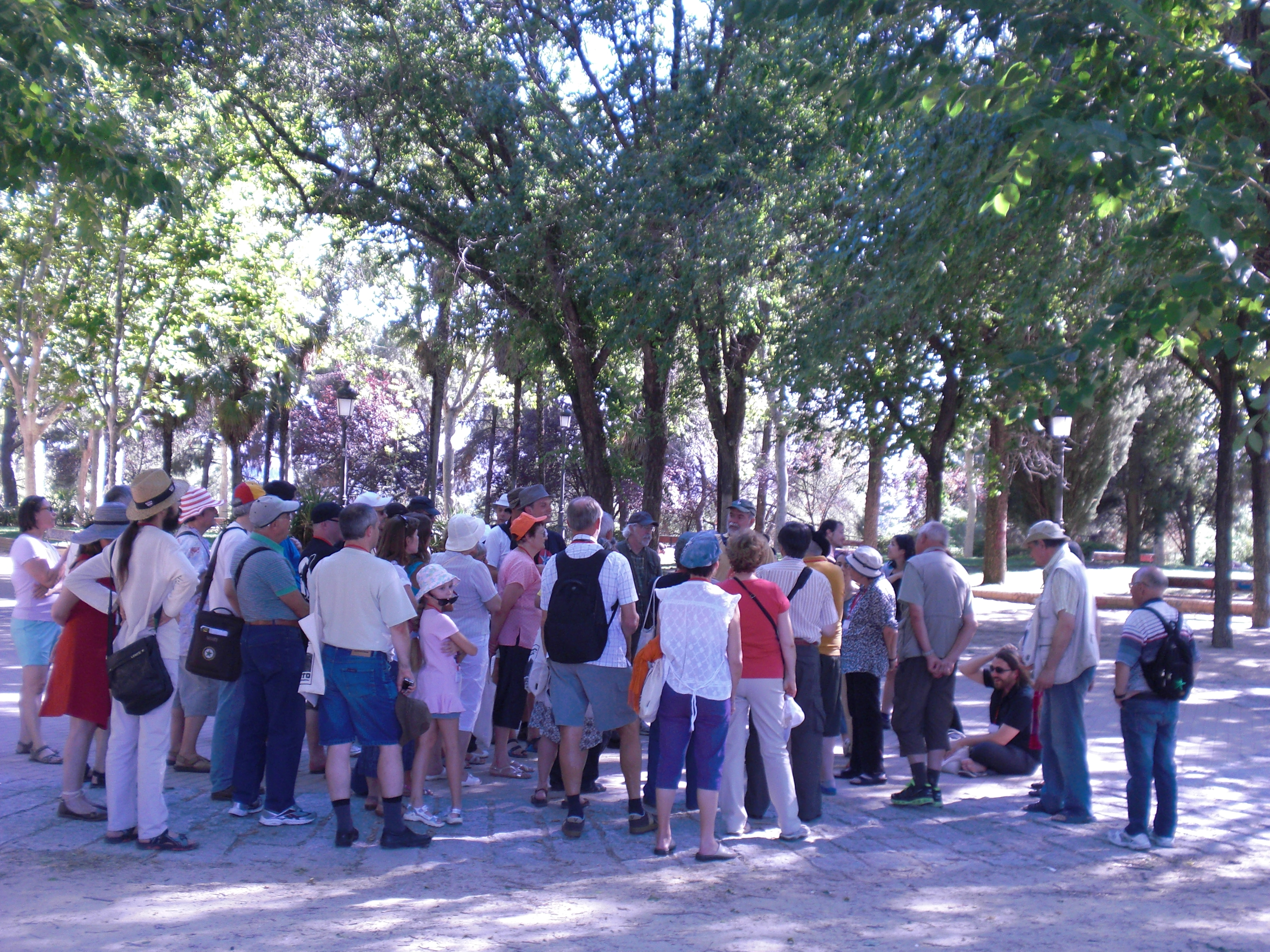 cuartel-montaña